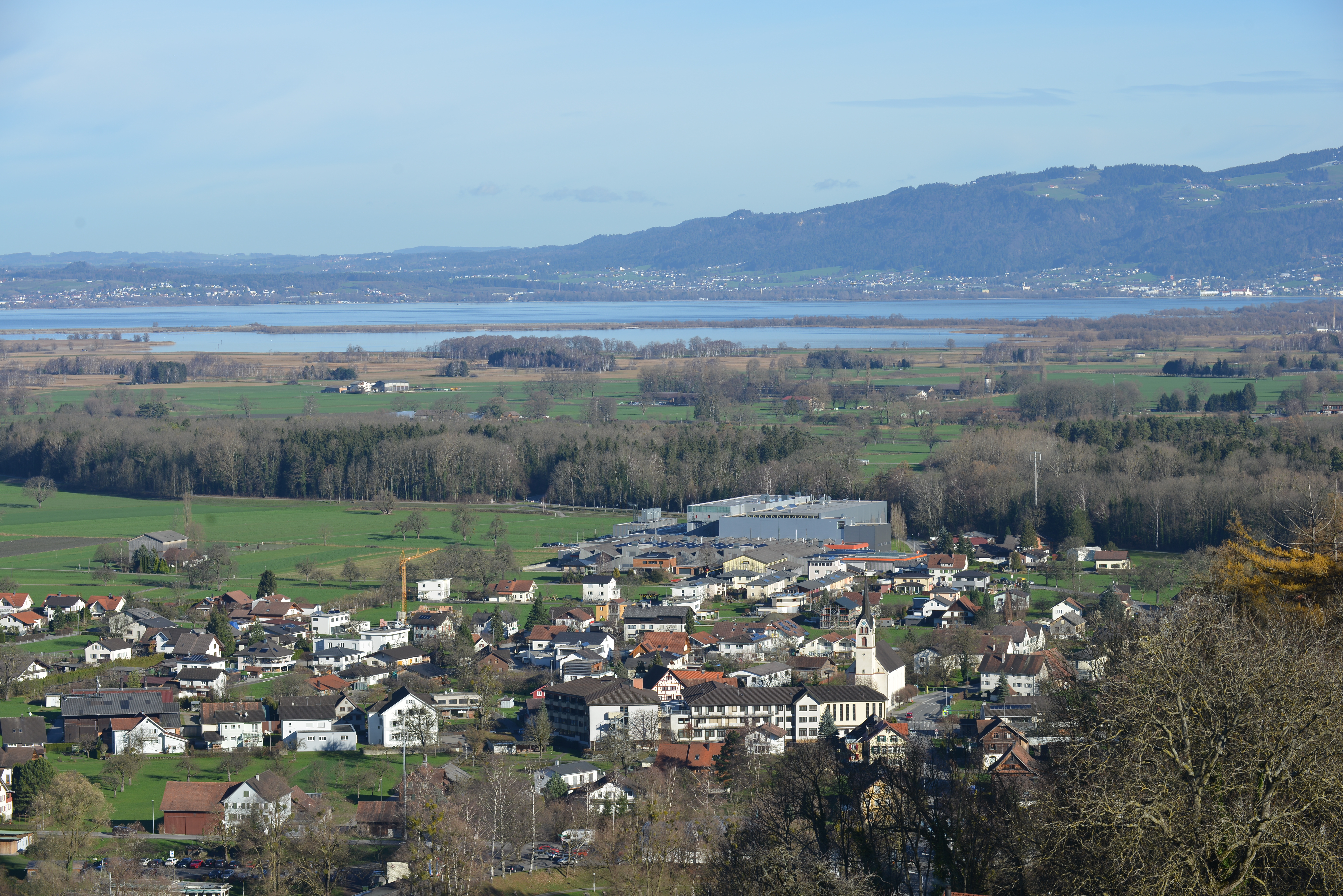 Ortsbild von der Gemeinde Gaißau. Im Hintergrund der Bodensee. Am Ortsrand das Werk 6 von Julius Blum GmbH